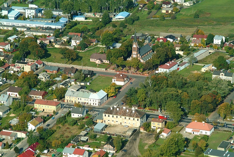 Zdjęcie lotnicze centralnej części miejscowości Kałuszyn z kościołem